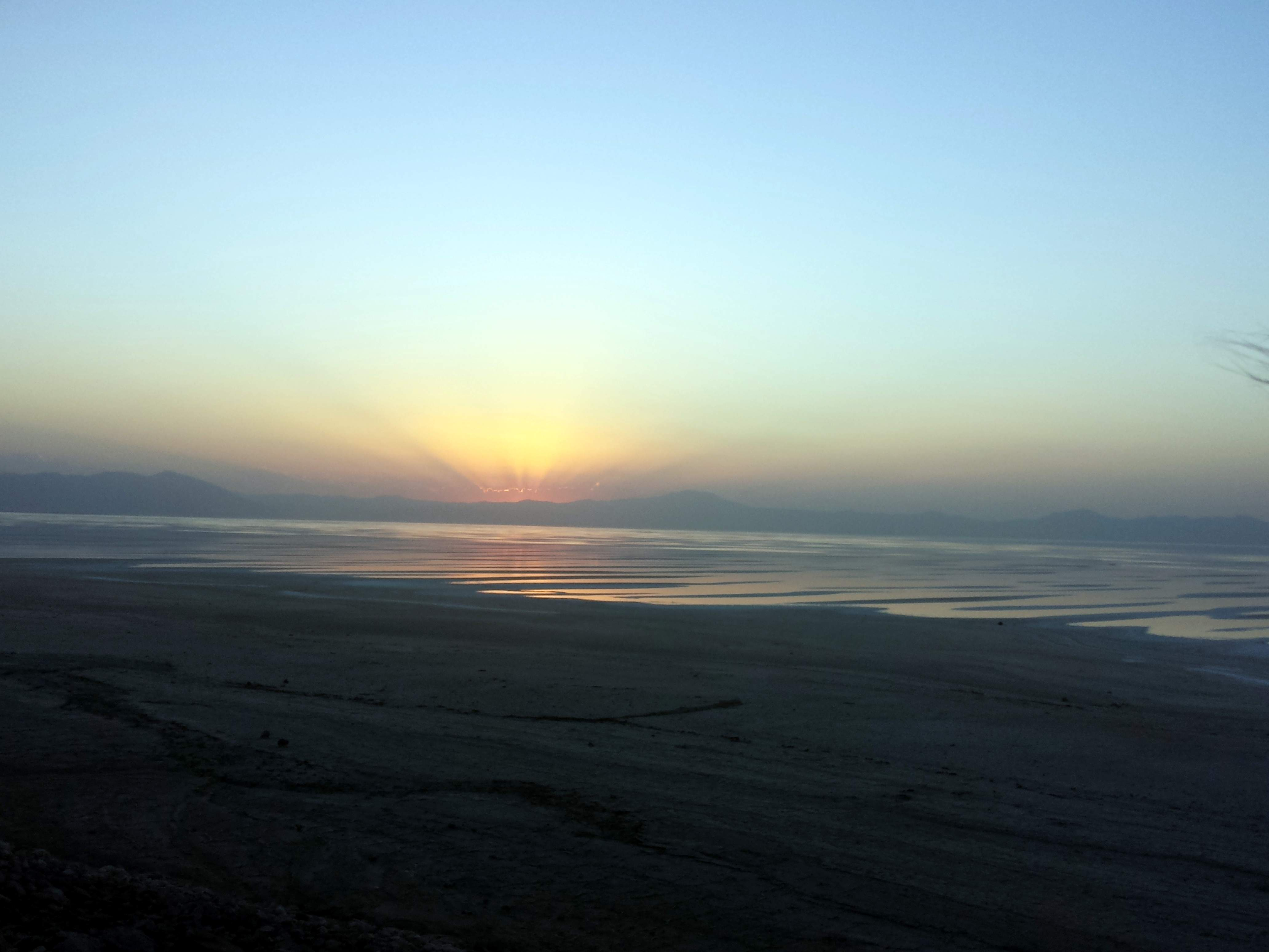 دریاچه خشک شده اورمیه